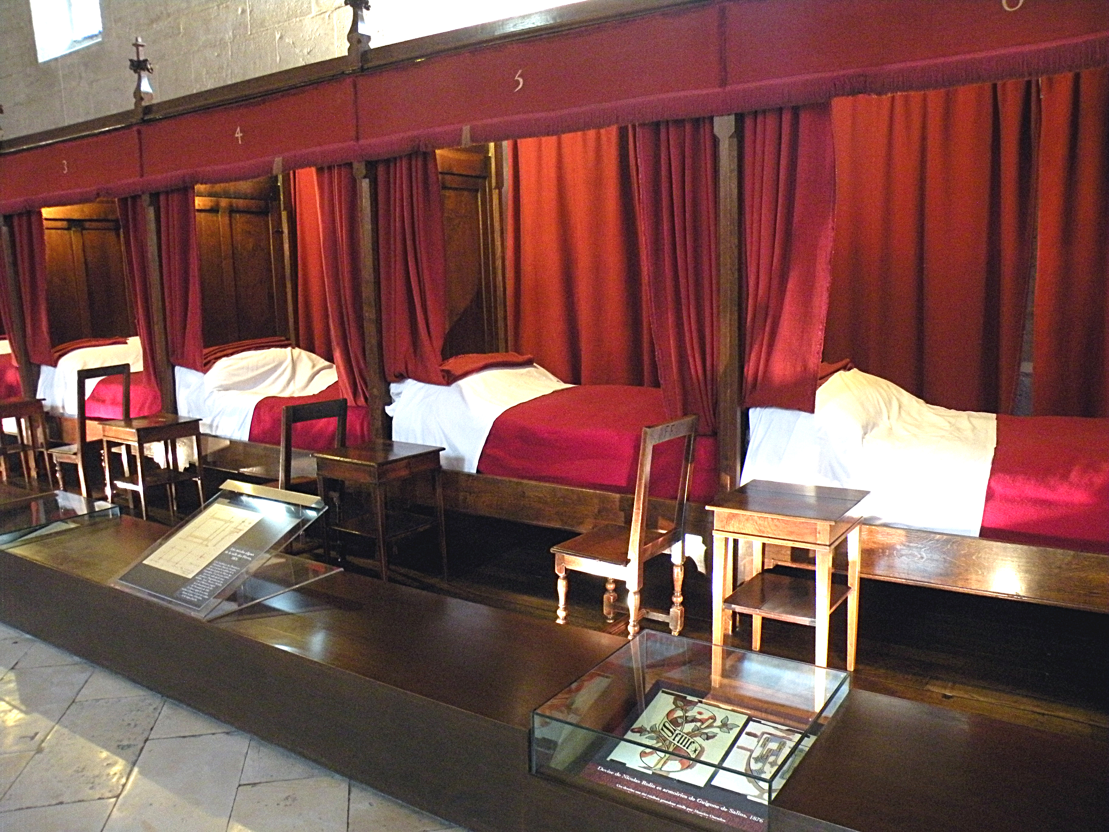 Бон. Двухместные кабины хосписа.